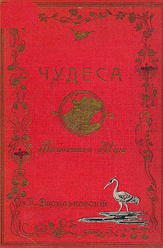 Васильковский, П. Е. Чудеса животного мира: (зоология для всех) : хрестоматия для чтения в семье и в школе / П. Е. Васильковский ; [оформл. В. Берингера] ; рис. В. Кунерта, Г. Мютцеля, И. Шишкина, Ф. Шпехта и др. – СПб. : Изд. А. С. Суворина, 1911